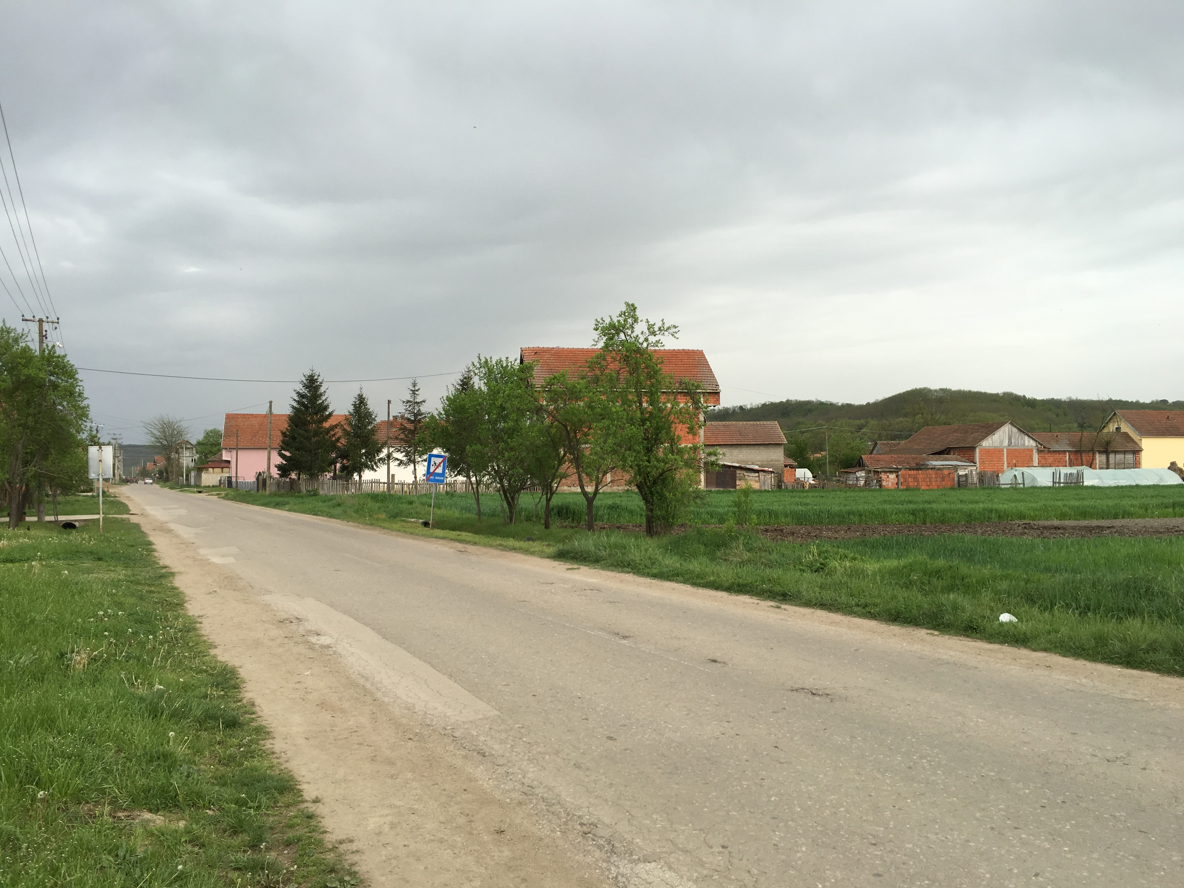 Srpski (latinica): Pridvorica, Leskovac